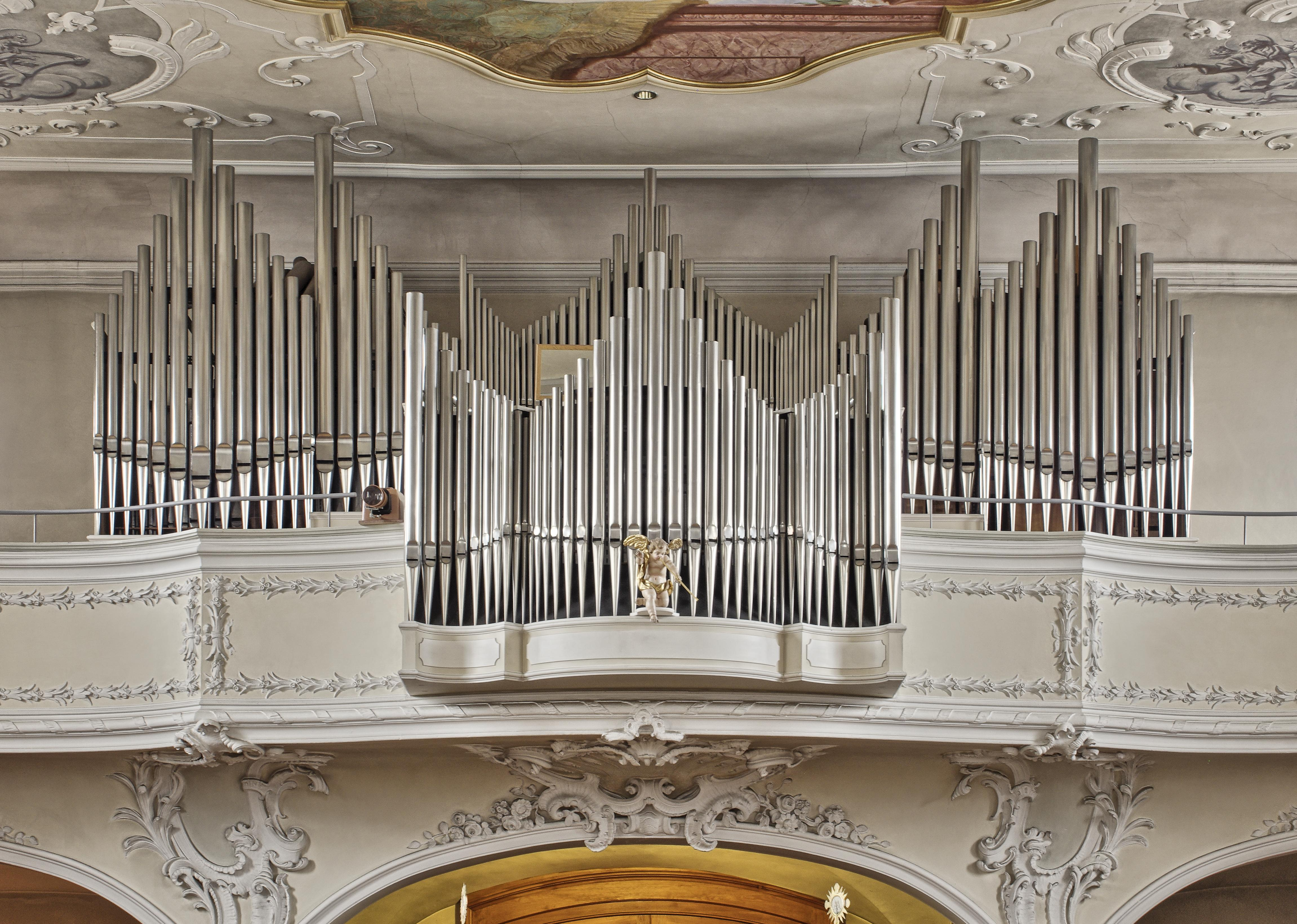 Bilder aus St. Märgen Bilder aus dem Innenraum der Kirche Die Orgel über dem Haupteingang